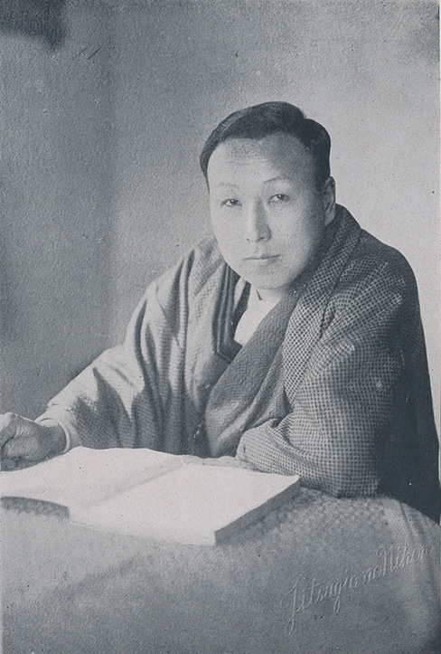 文人医師・高田義一郎 明治19年（1886年）- 昭和20年（1945年）